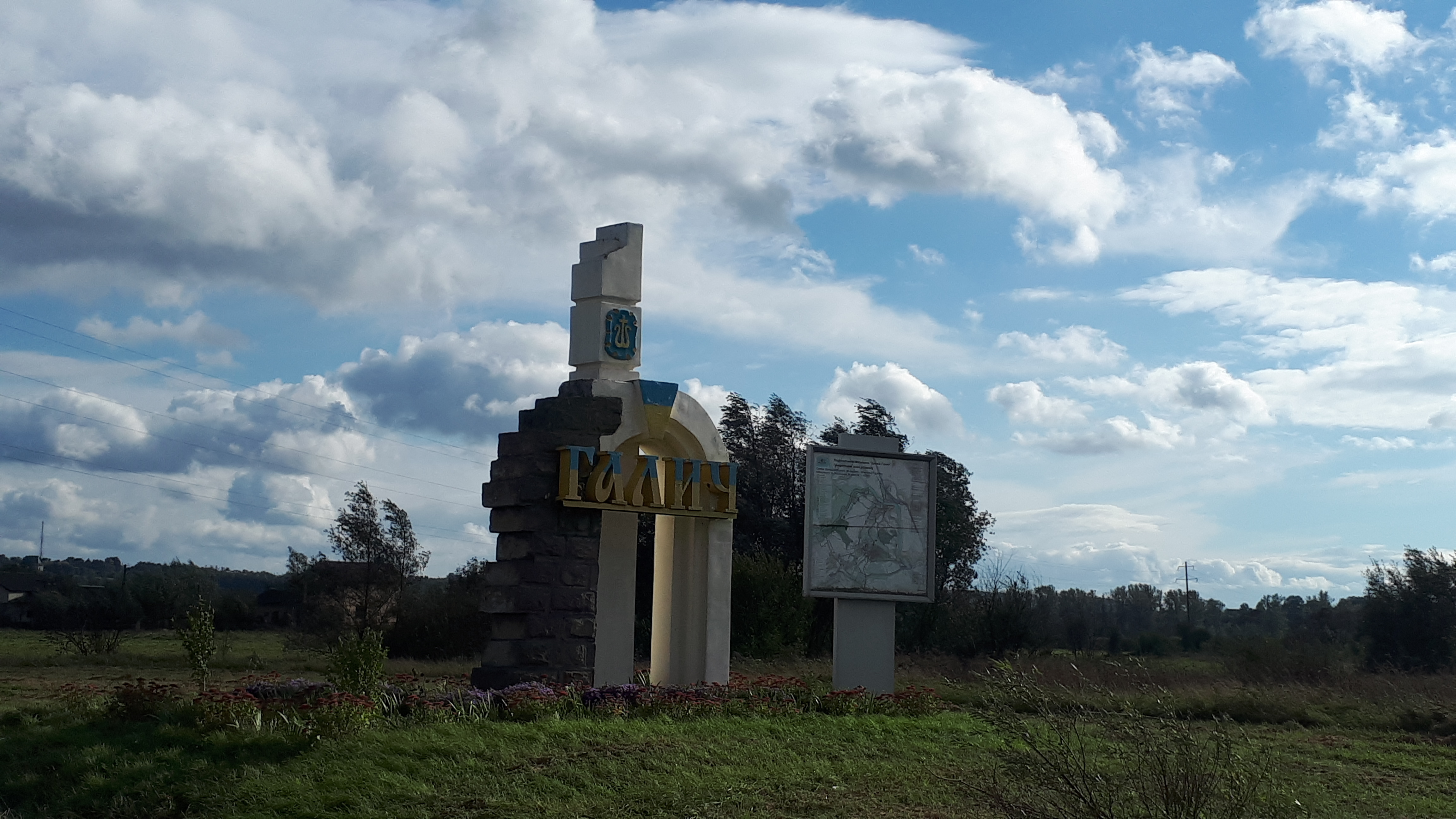 Знак перед містом Галич